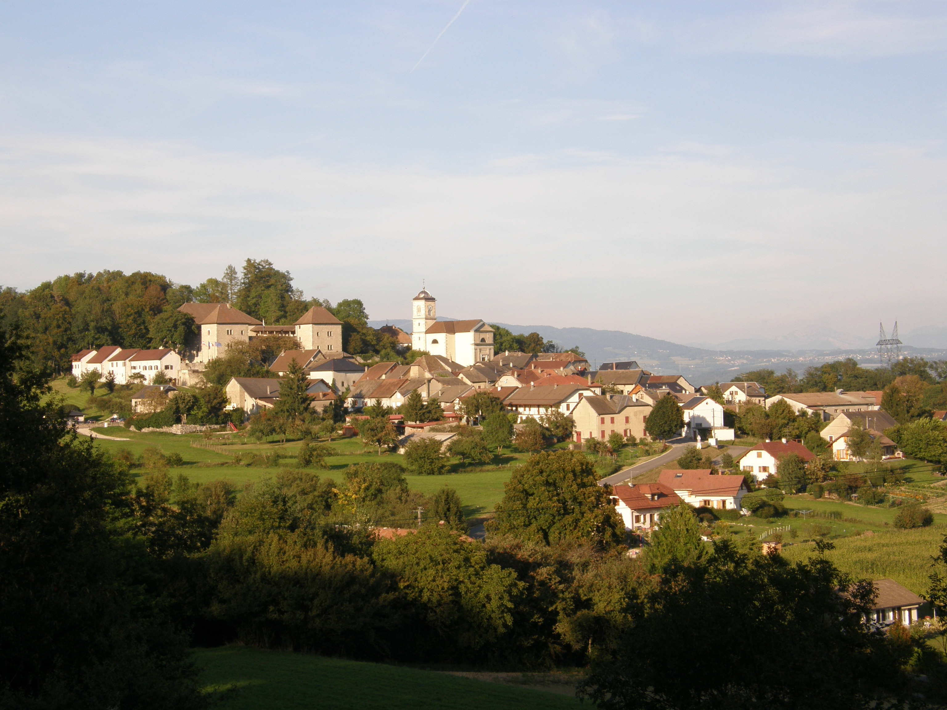 vue générale du village de Clermont en Genevois en Haute-Savoie